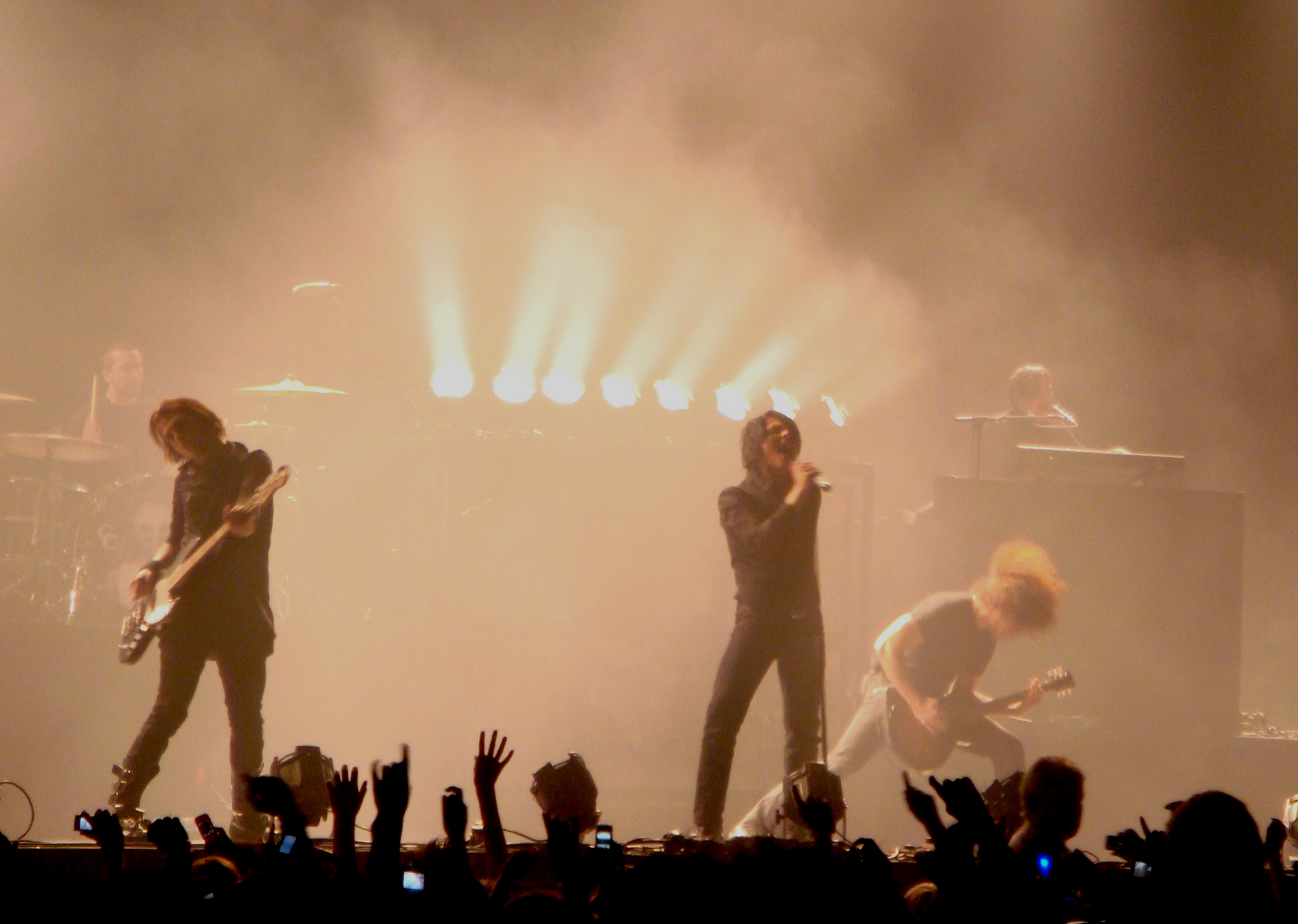 My Chemical Romance presentándose en vivo en el Metro Radio Arena de Newcastle, Inglaterra, Reino Unido, el 11 de noviembre de 2007.